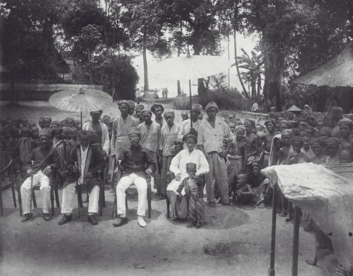 Foto. Portret van een vorst met zijn gevolg, Ambon